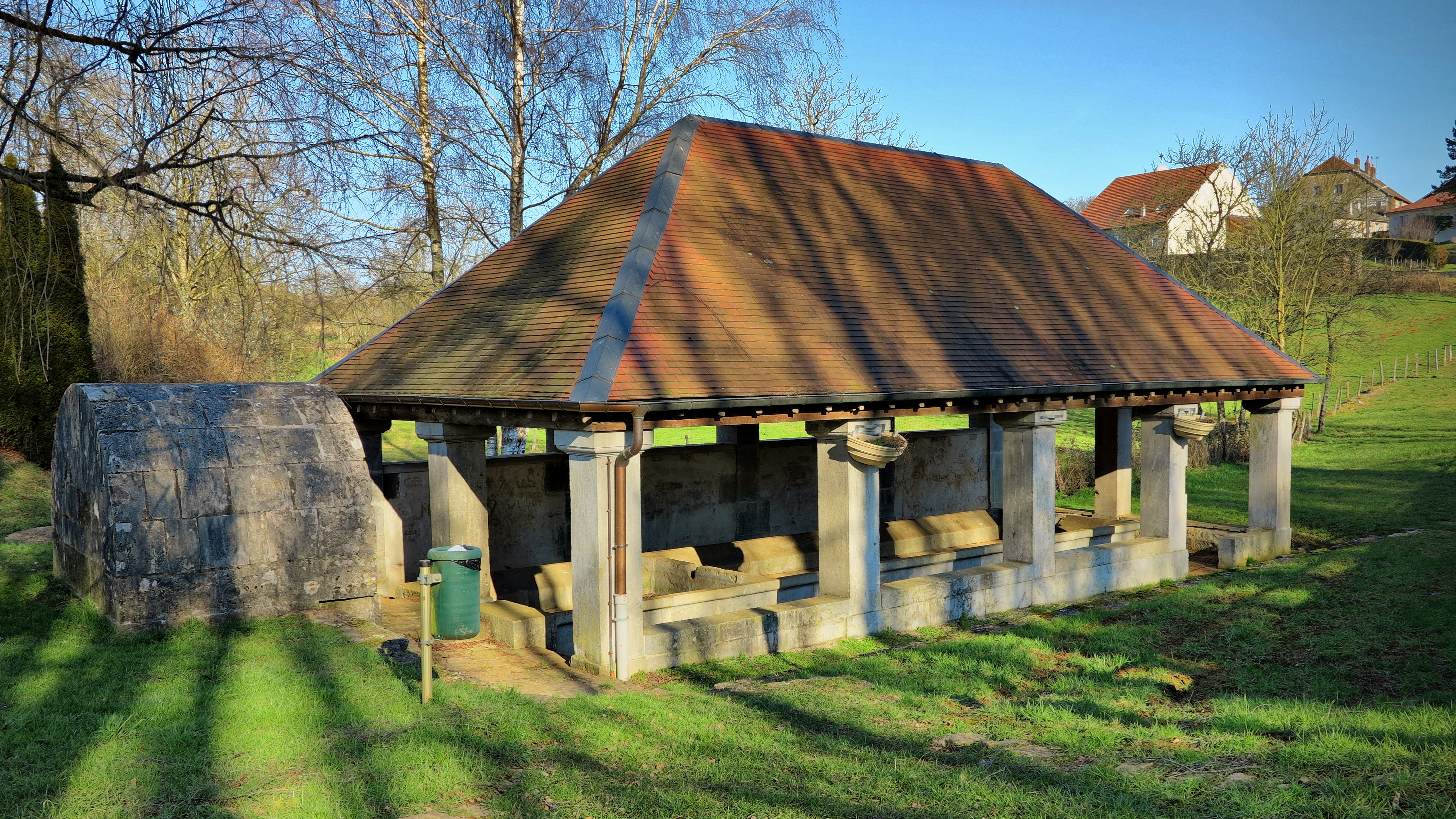 La fontaine-lavoir restaurée